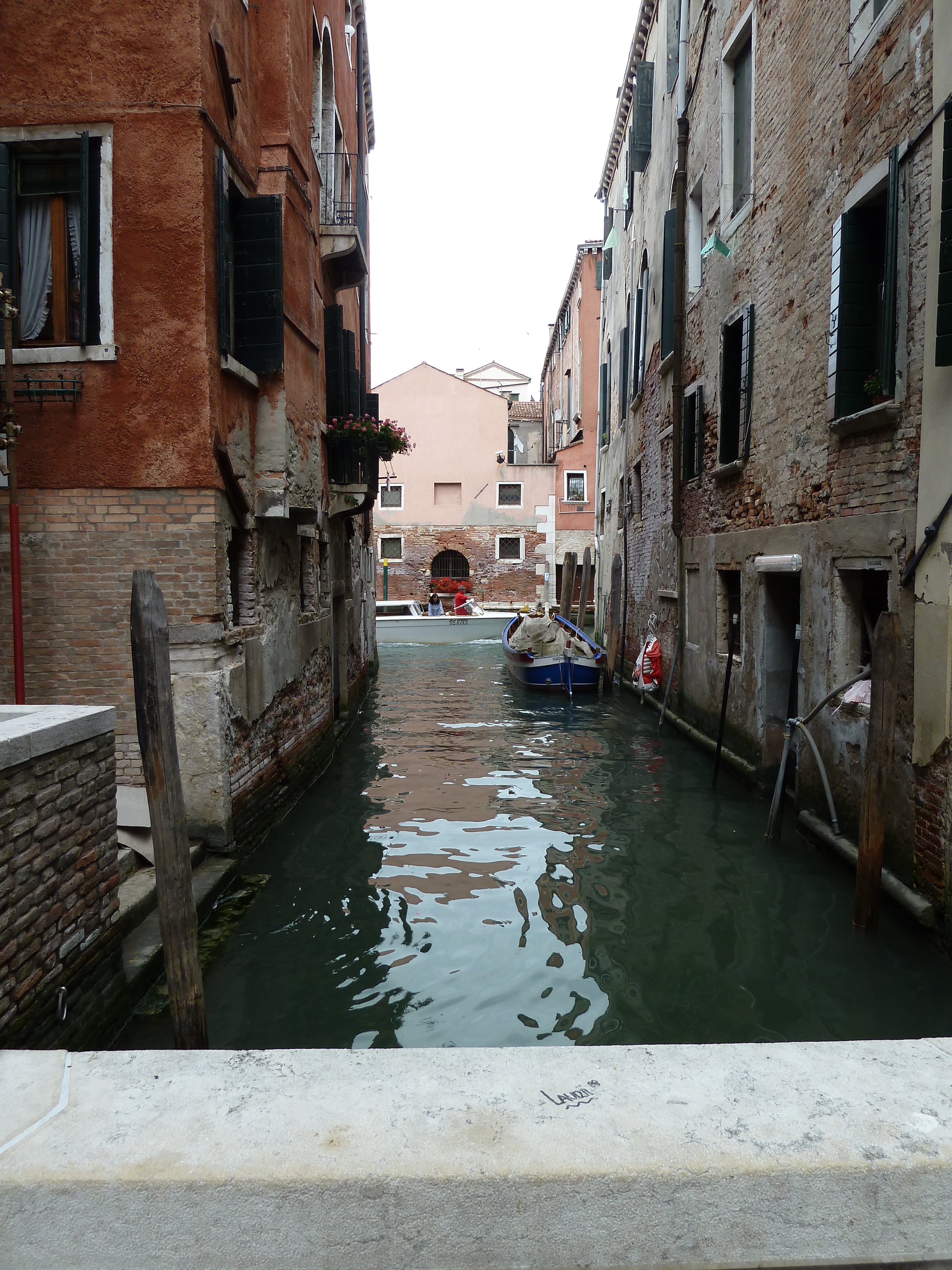 rio amaltea